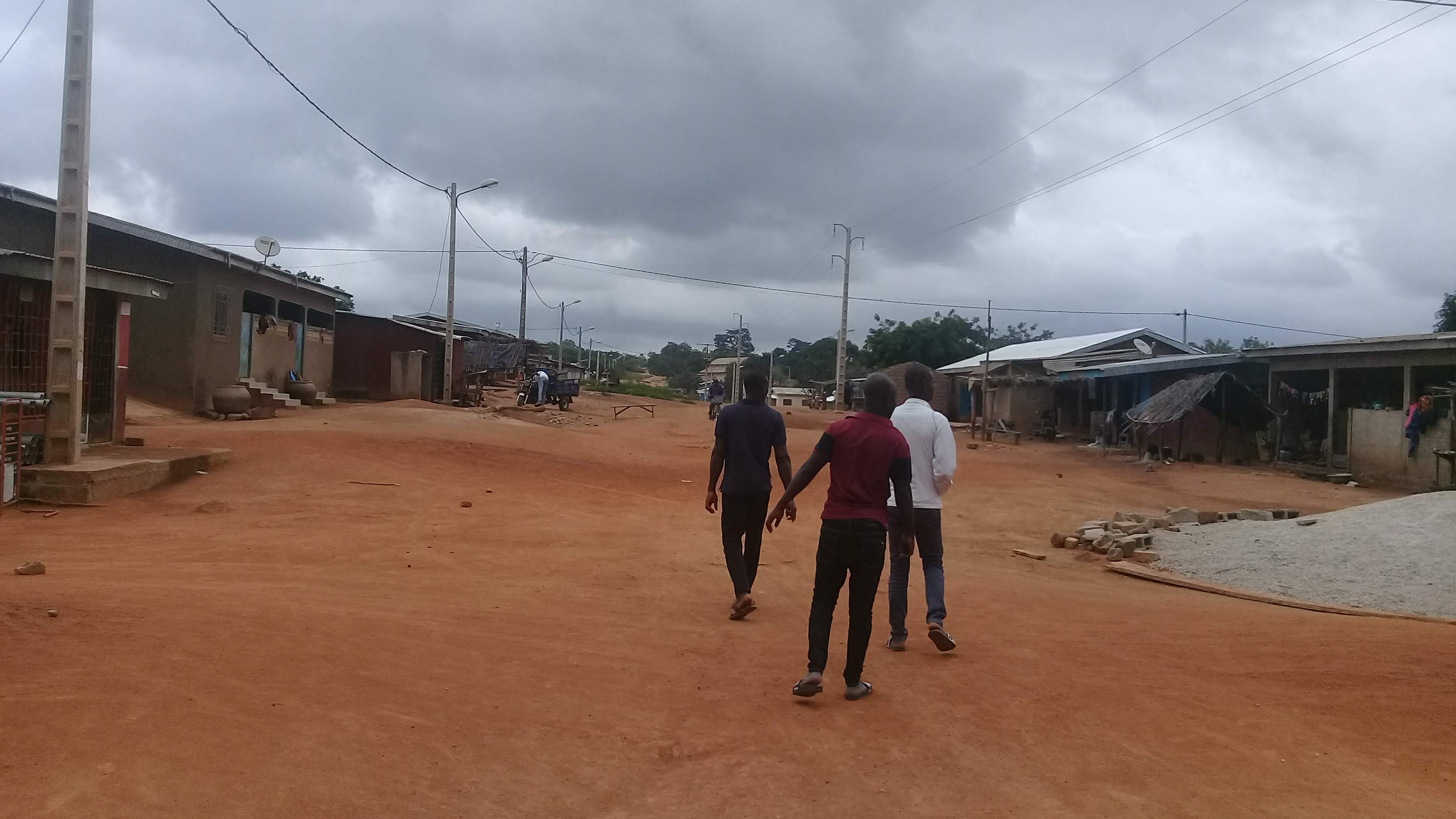 Torossanguéhi est une localité du nord-est de la Côte d'Ivoire